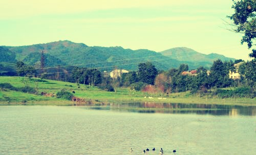 Kəndin cənub-qərb tərəfdən təsviri